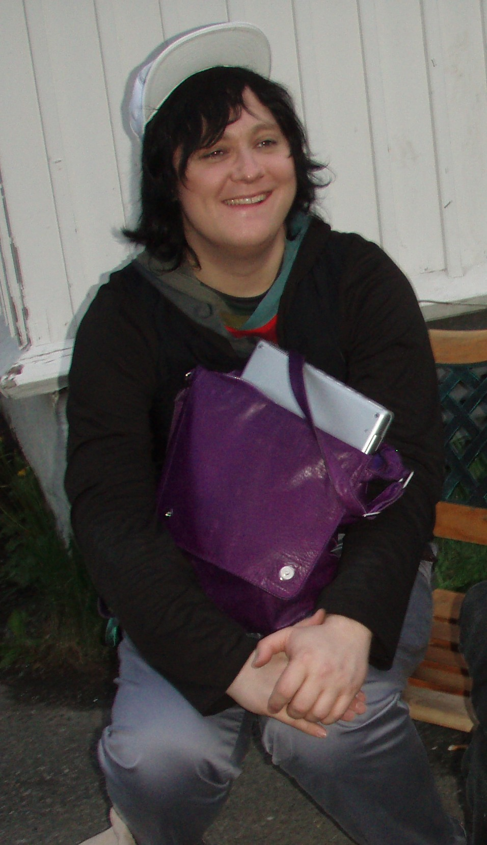 Anohni, Lillehammer 2007